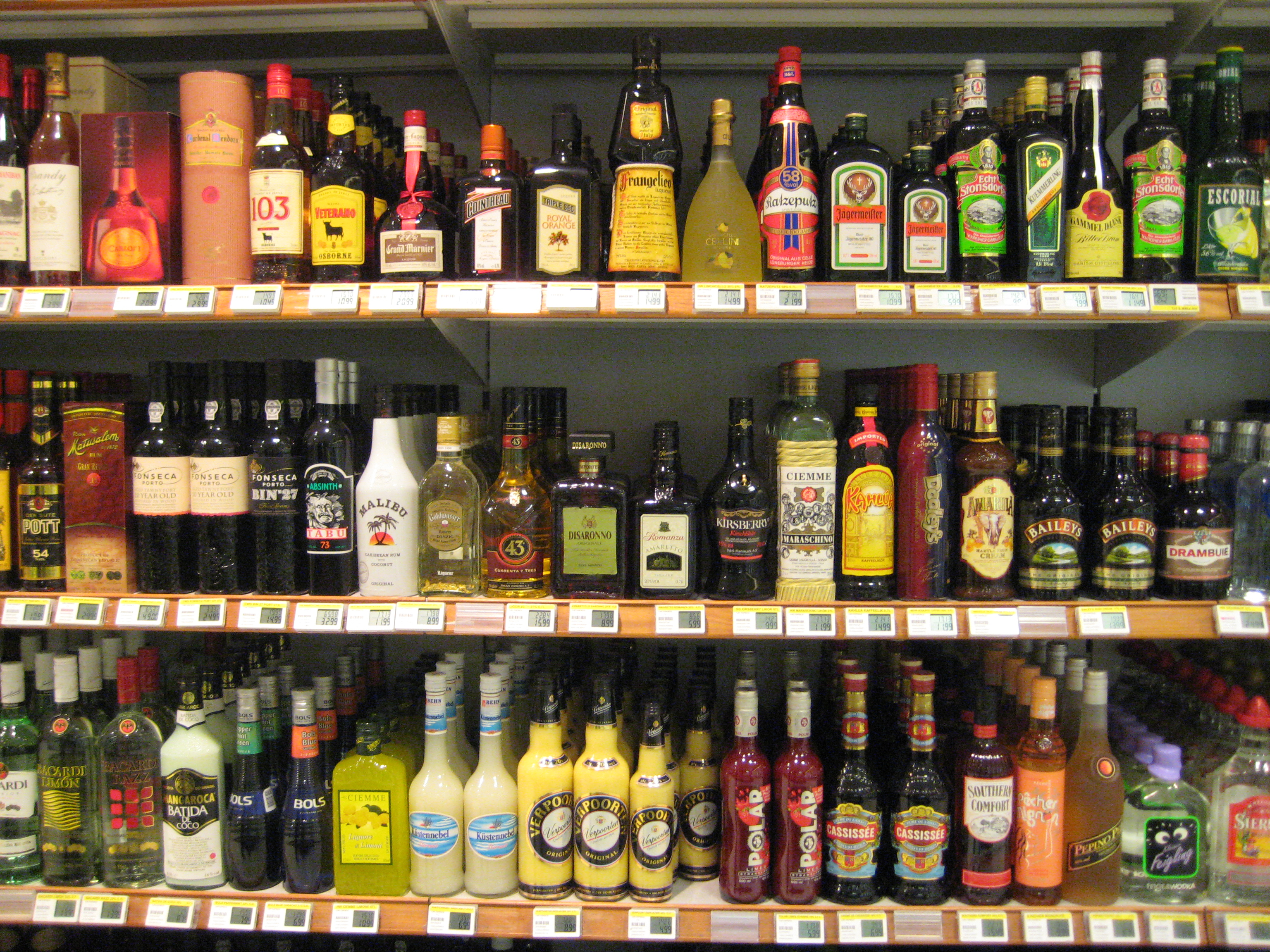 Spirituosenauswahl im Budnikowsky, Sylt